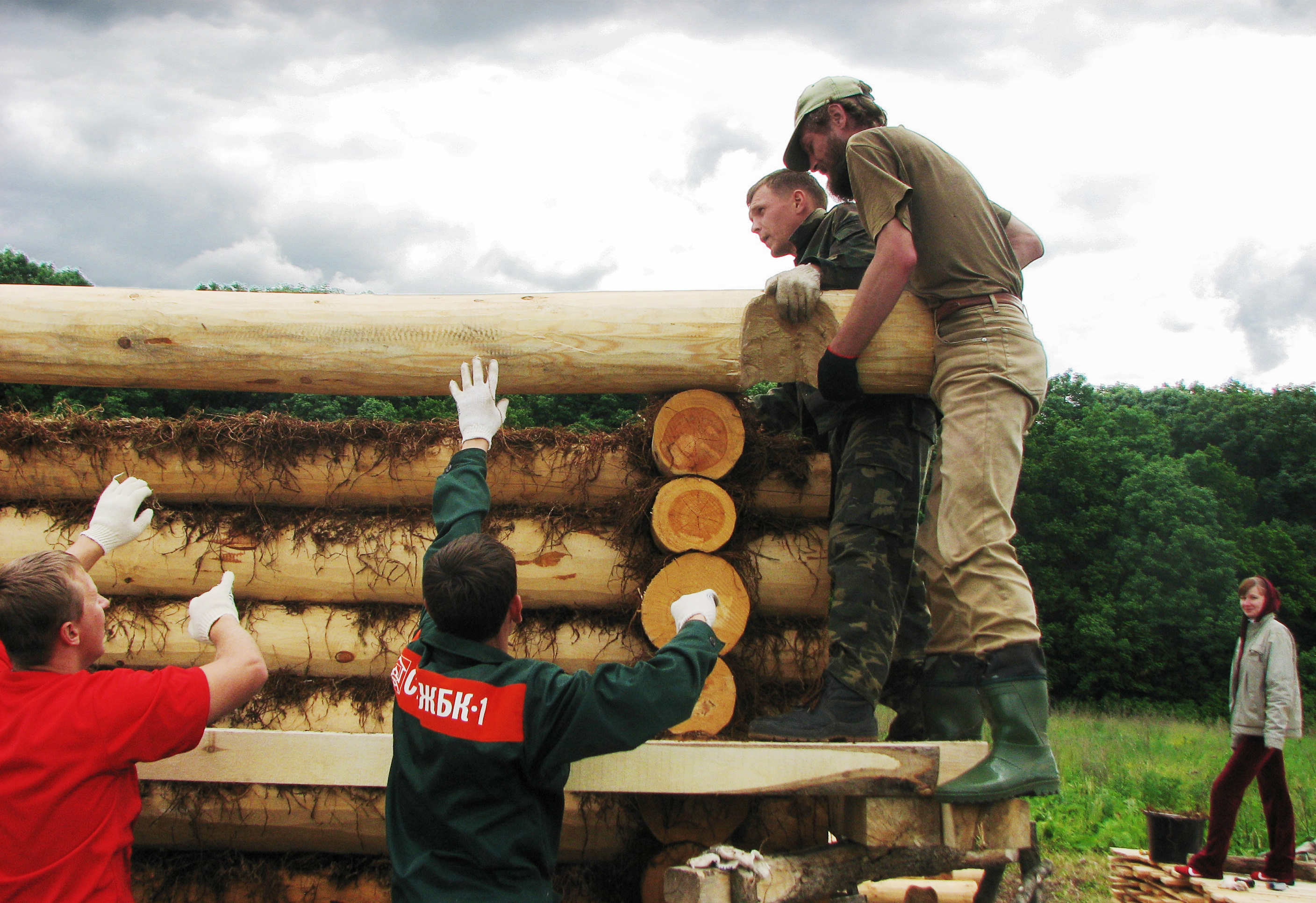 Родовое экопоселение «Кореньские родники»: толока. 2008.